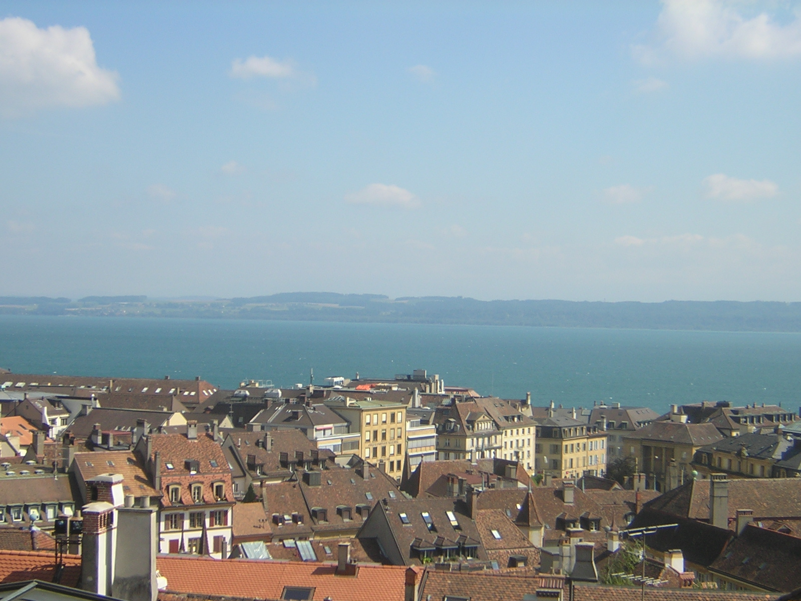 Vue du lac de Neuchâtel depuis la ville de Neuchâtel (suisse)